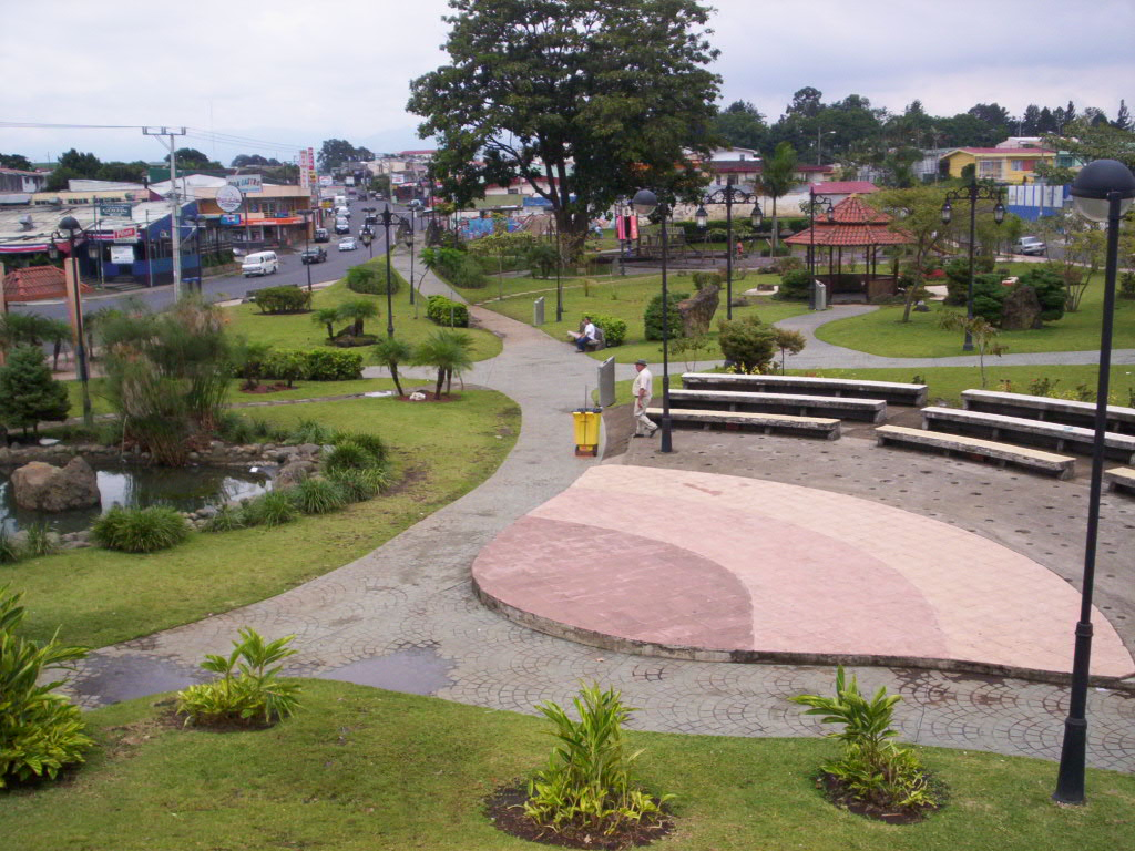 vista hacia el norte, Parque Okayama, Costa Rica